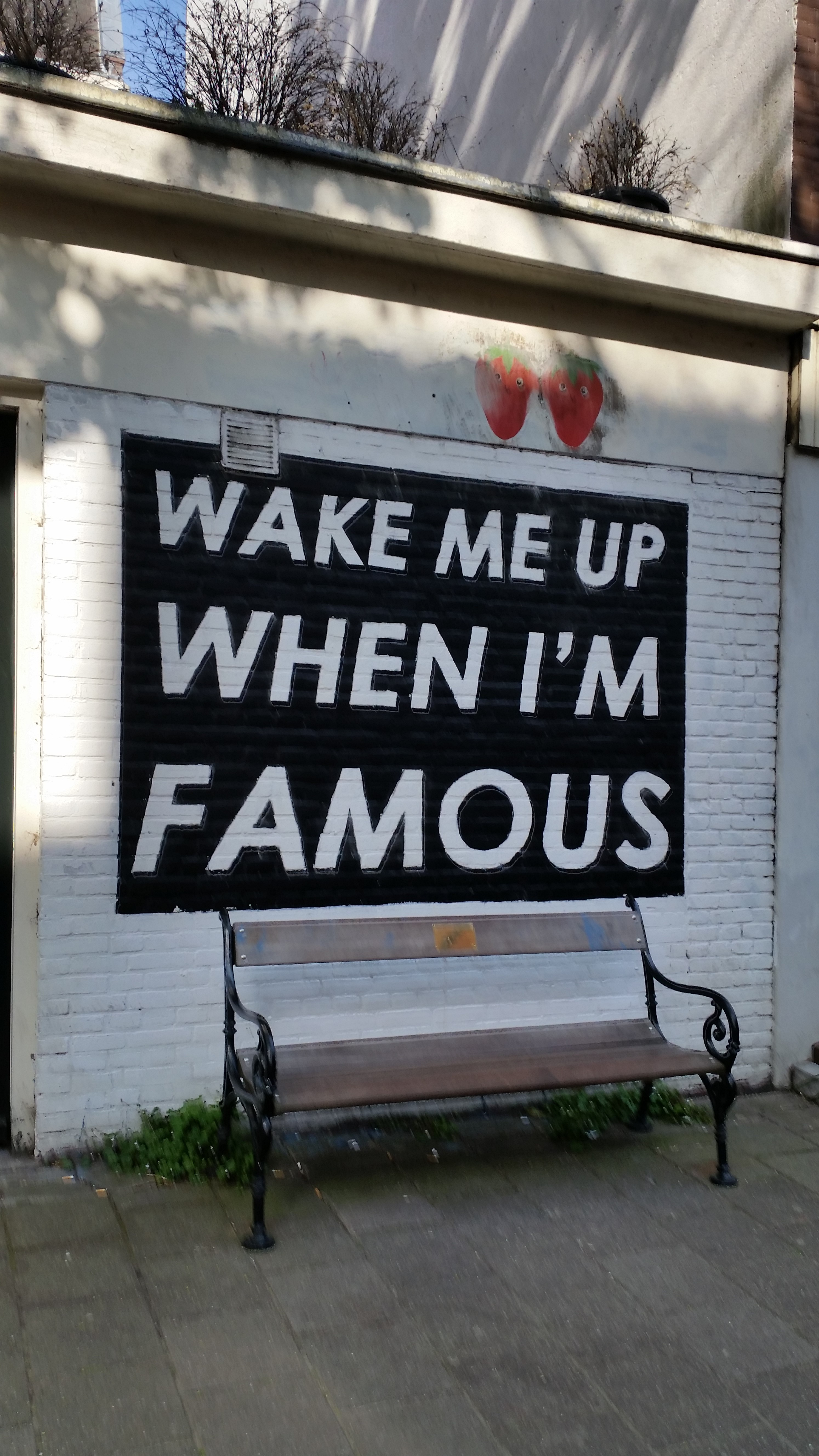 Muurschildering Frans Halsstraat 64, Amsterdam door Jurriaan en Rinus van Hall